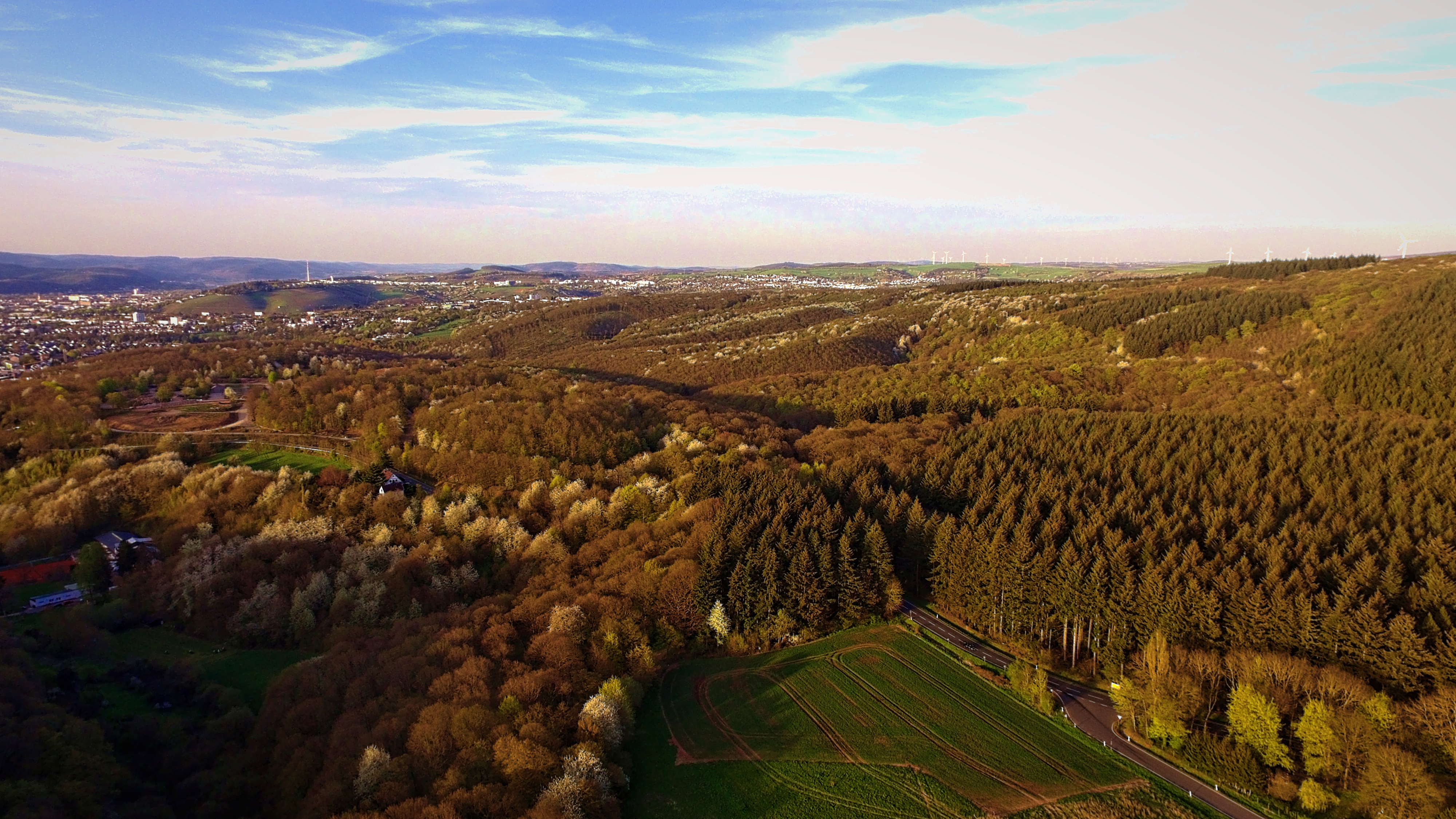 Trier - Naturschutzgebiet und FFH Gebiet Mattheiser Wald - Blick von Süden, etwa vom Haus Kobenbach auf das Naturschutzgebiet (südliche 2/3)